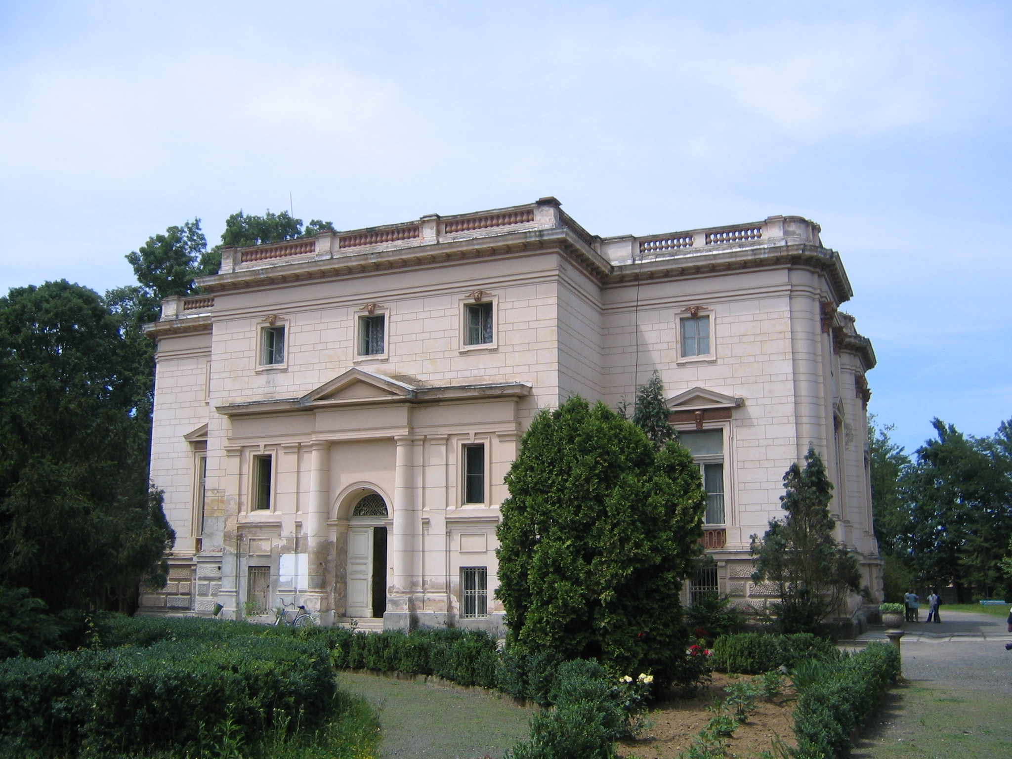 Castelul de la Capalnas, Arad